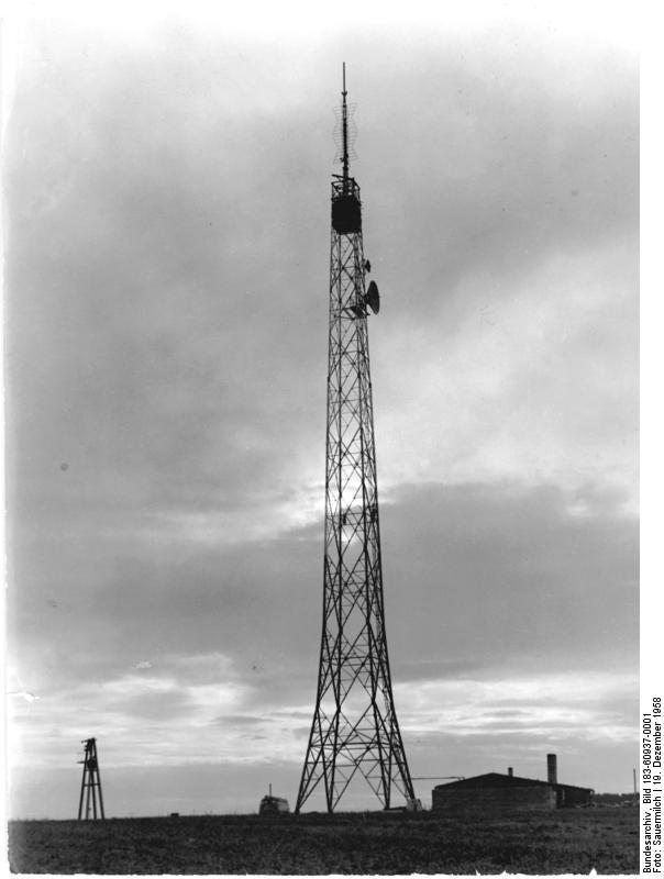 Cottbus, Funkmast Zentralbild Sauermilch Vgt-Ho 19.12.1958 Fernsehsender Cottbus begann mit Versuchssendungen Mit Versuchssendungen hat am 6.12.1958 der neuerbaute Fernsehsender bei Calau im Bezirk Cottbus begonnen. Die Anlage mit deren bau erst im Juli dieses Jahres begonnen wurde, setzt setzt sich aus einem achtzig Meter hohen Gitterstahlmast zu einem Antennenträger von weiteren 15 Metern zusammen. Dieser Sender stellt nur eine Übergangslösung dar, die in den nächsten Jahren durch einen Massiven ähnlich dem in Dequede bei Osterburg ersetzt werden soll. UBz: Der Fernsehsender Cottbus.